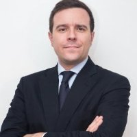 photographie edouard fillias